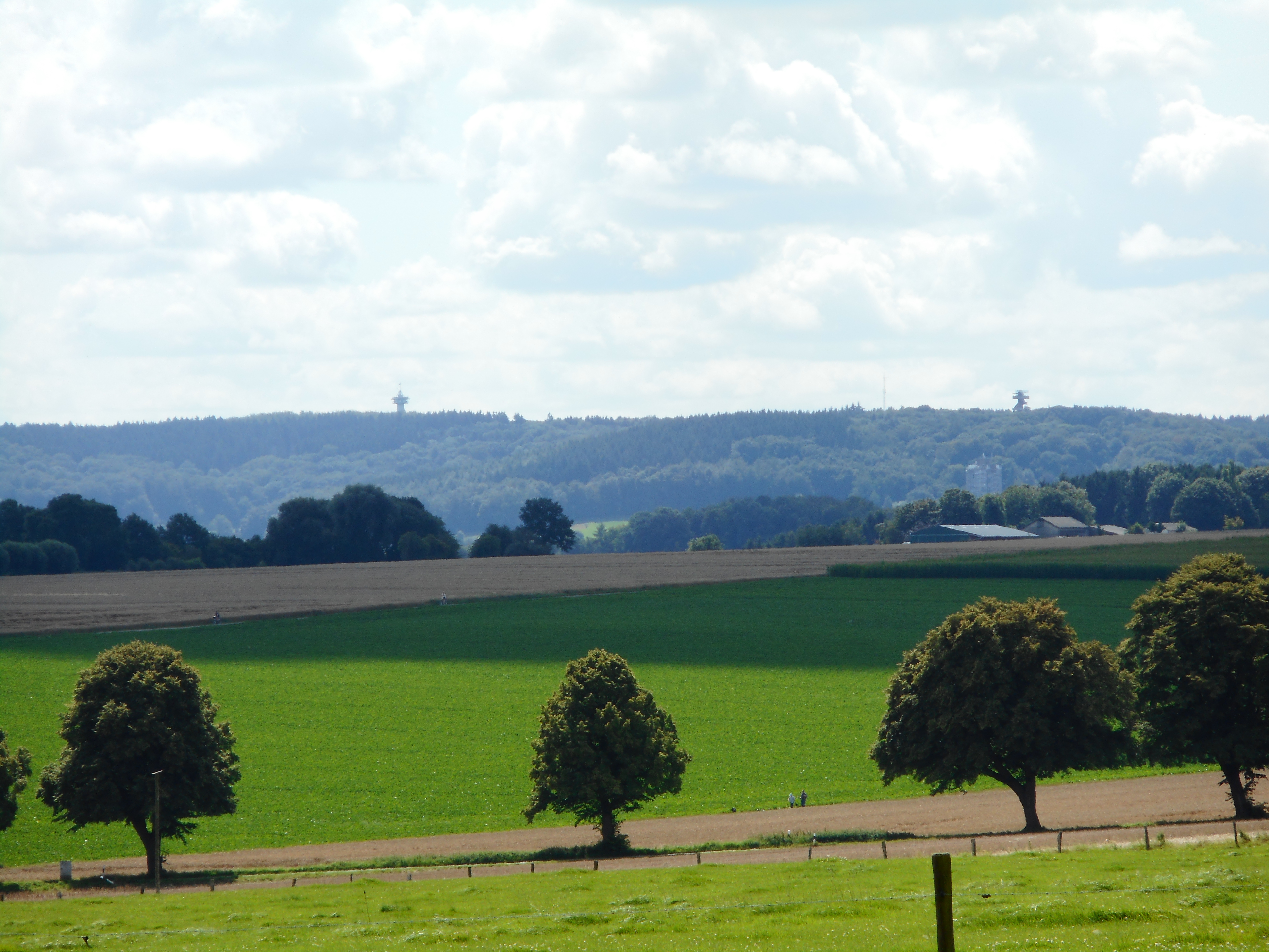 Blick von Vetschauer Berg auf das Dreiländereck bei Vaals (der Vaalserberg) mit links den Baudouinturm und rechts den Wilhelminaturm